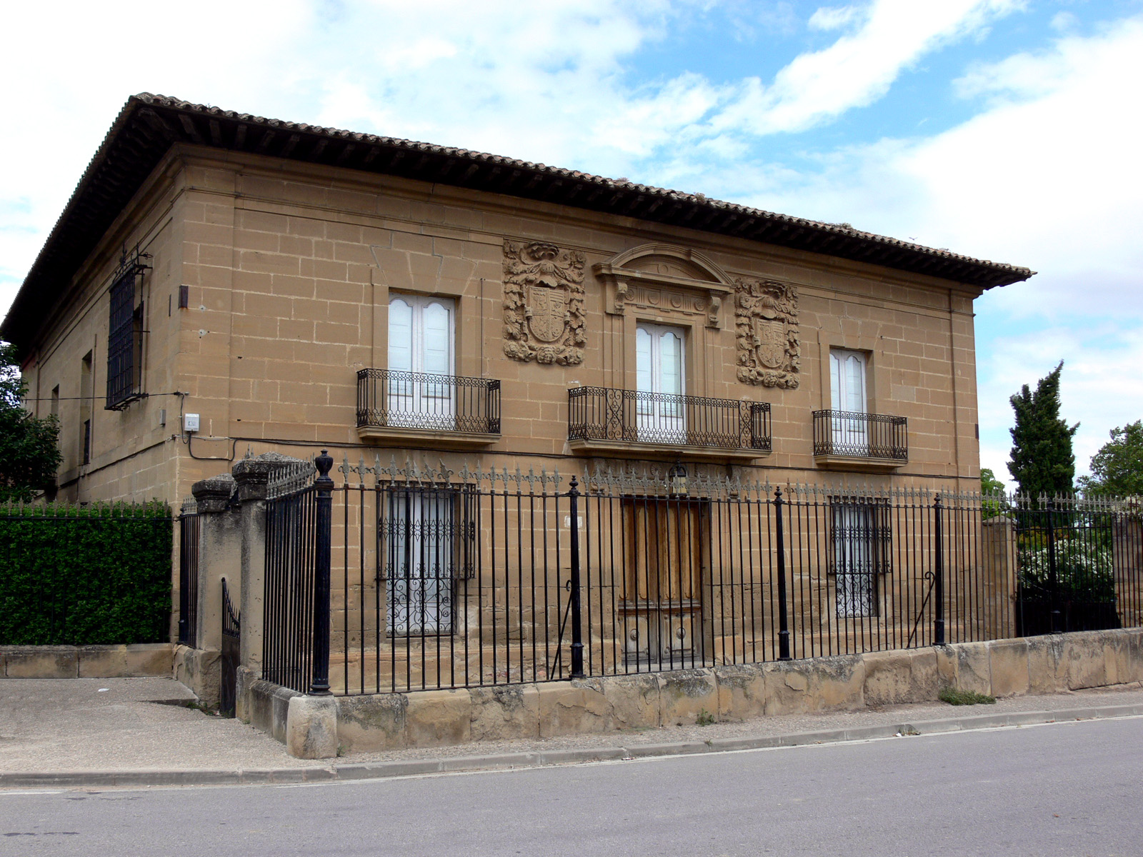 Palacio de los Marqueses de Terán en Ollauri (La Rioja - España)